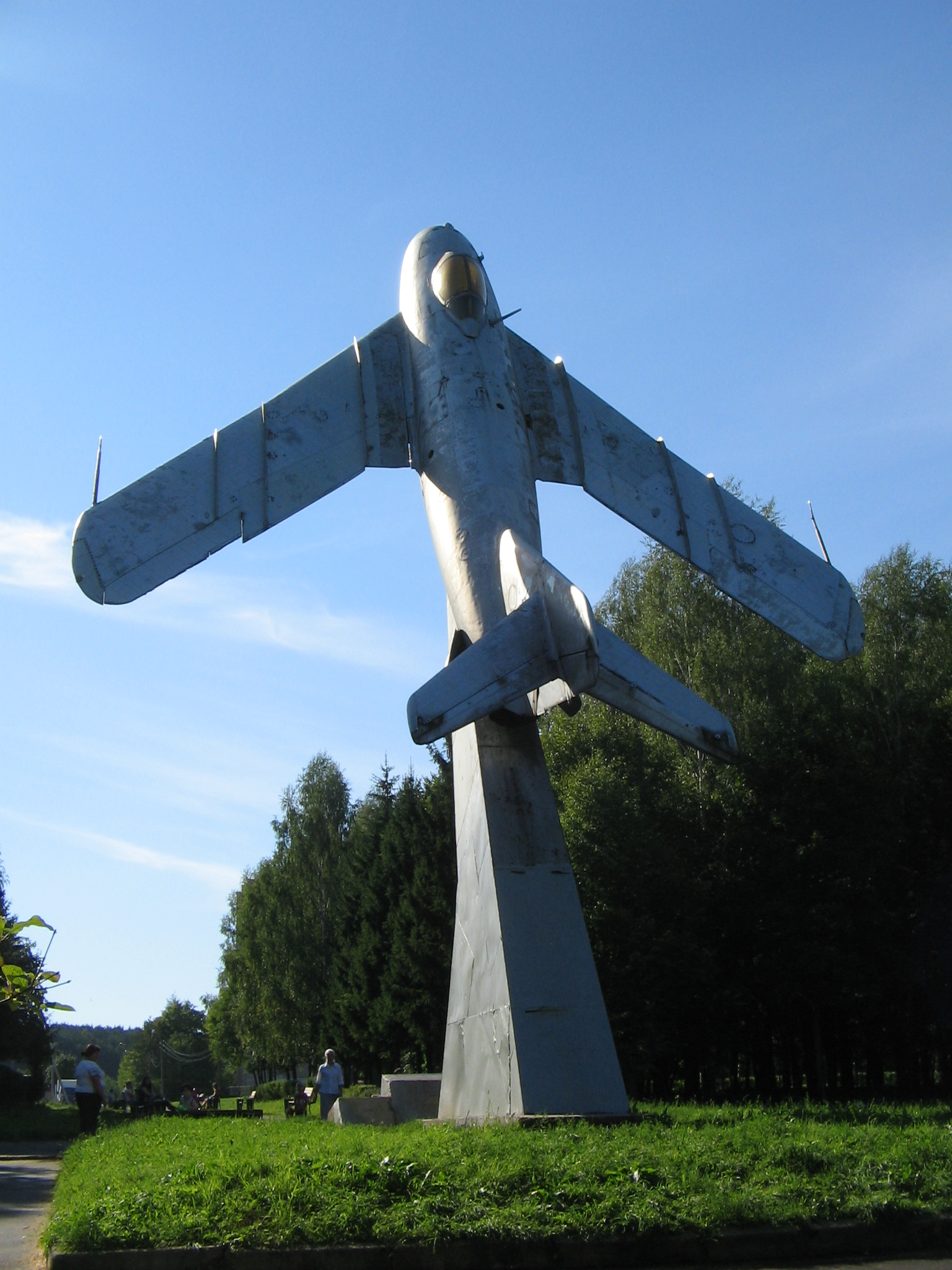 Самолёт МиГ-17 (Наро-Фоминск)